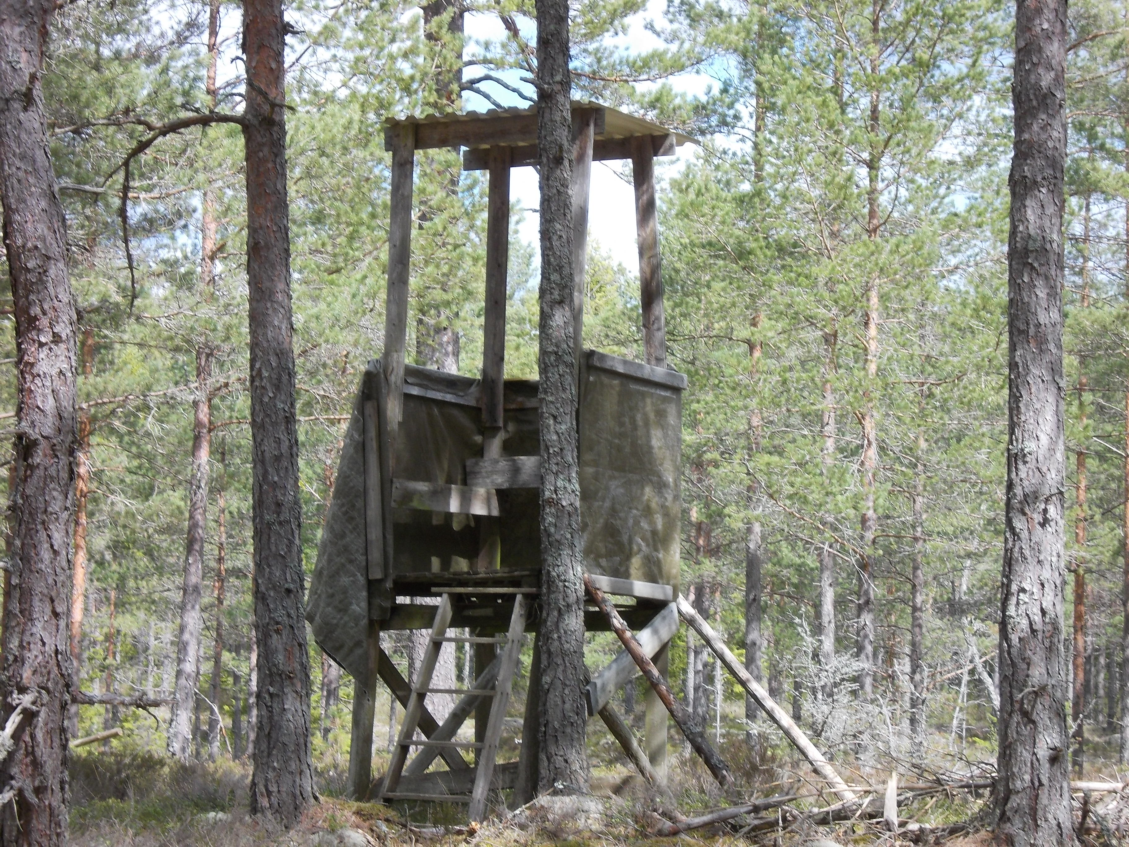 Skitåsen är är ett naturreservat i Käglan i norra Närke.